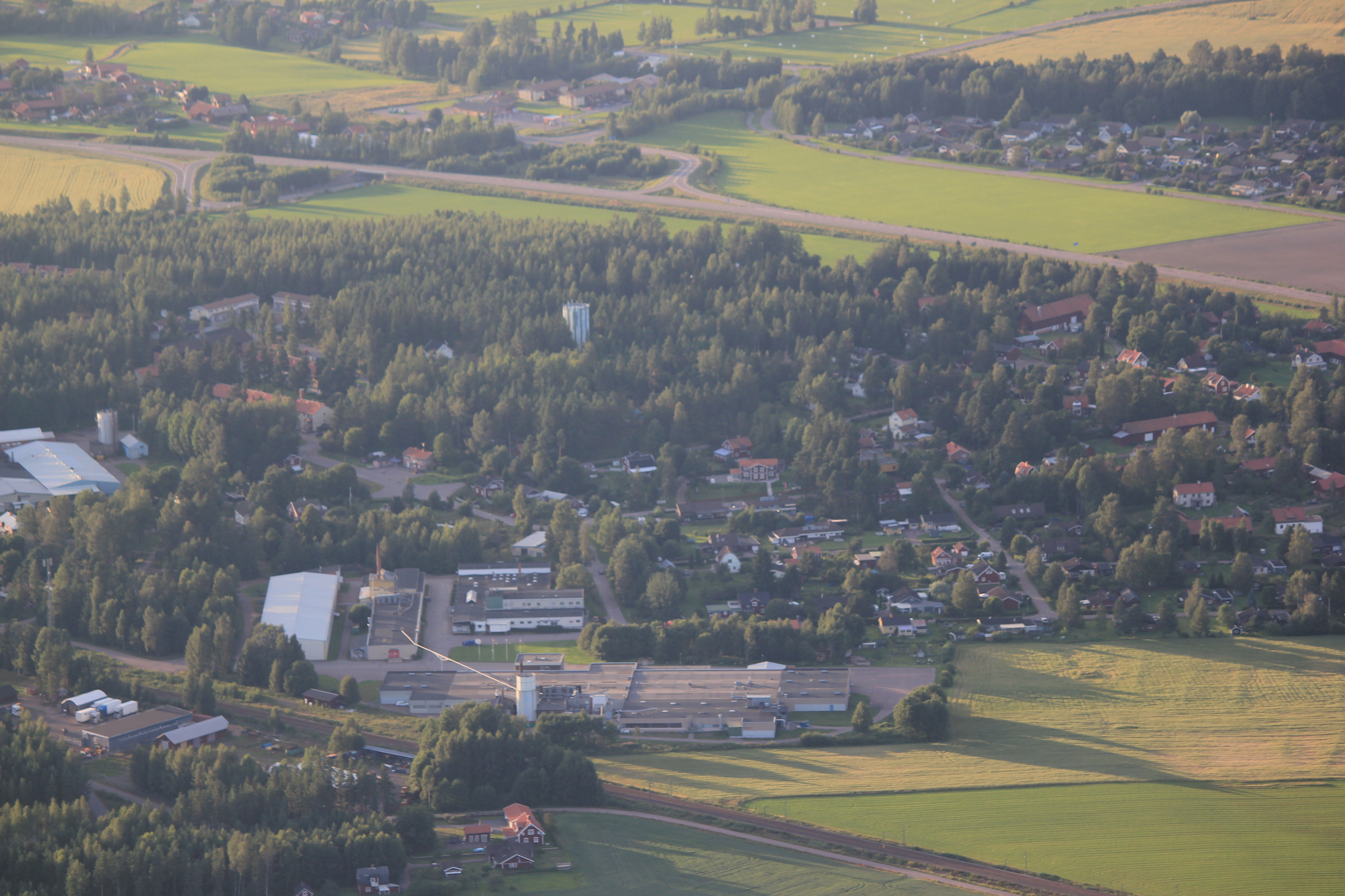 Flygfoto över Säters kommun, Dalarnas län, Sverige This aerial photograph has been approved for publishing by the Swedish Armed Forces with the ID: FMTM 10 830:11043 This tag does not indicate the copyright status of the attached work. A normal copyright tag is still required. See Commons:Licensing for more information. English | svenska | +/−